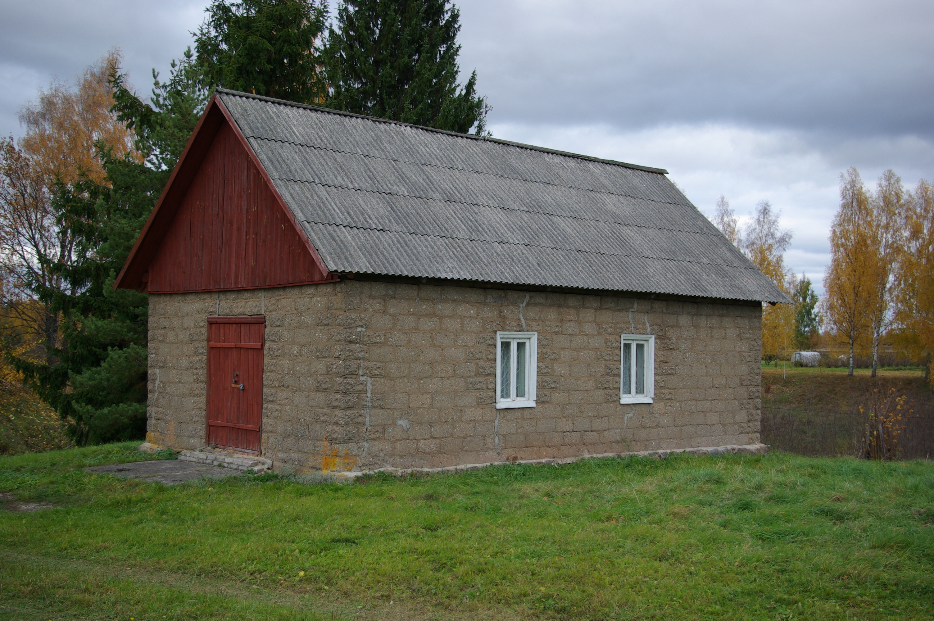 Küllätüvä tsässon